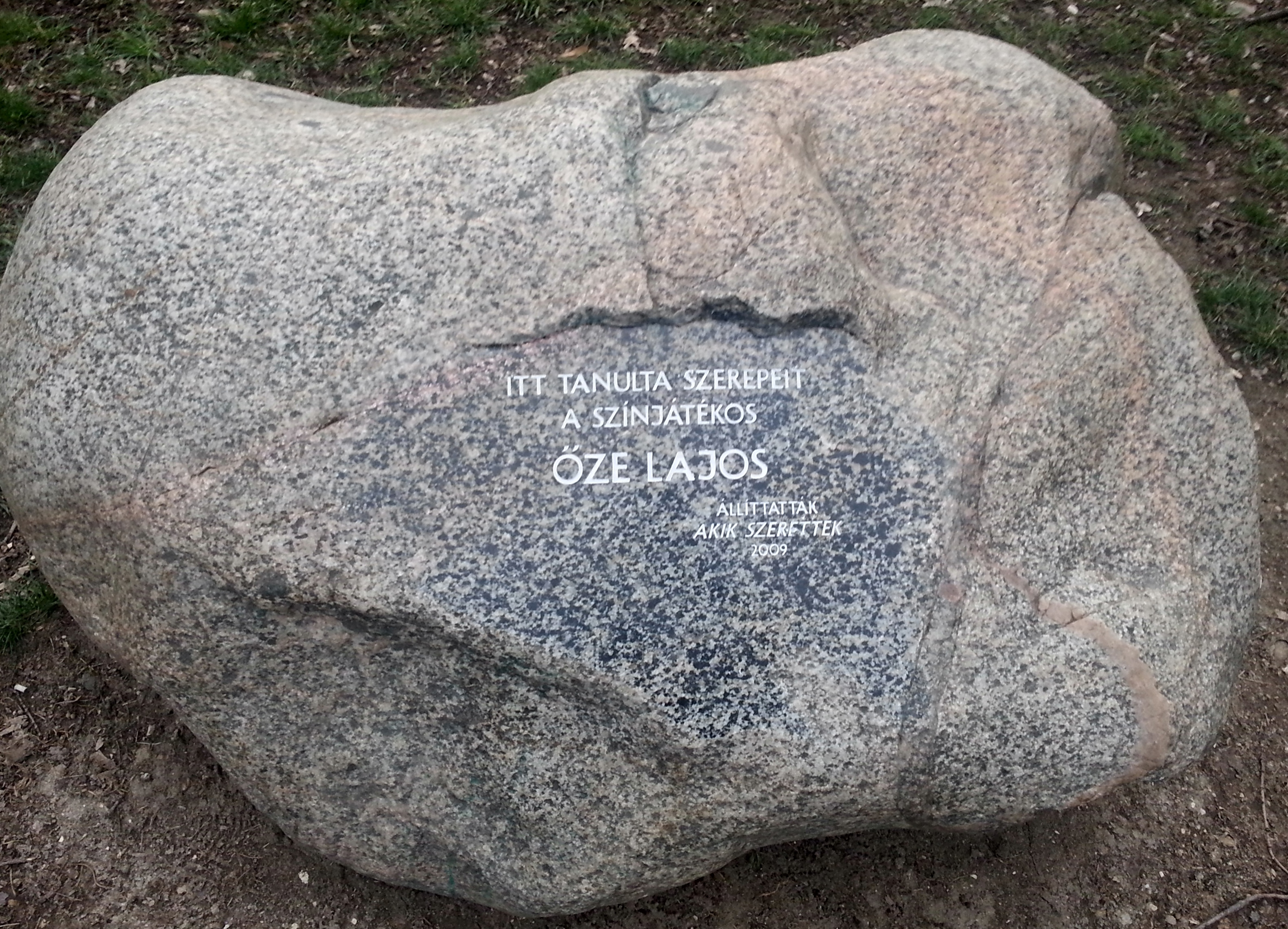 Őze Lajos emlékköve a Tabán lejtőn. Naphegy utca 67 alatti zöld terület. A Kereszt és Naphegy utca saroktól 30 méterre.